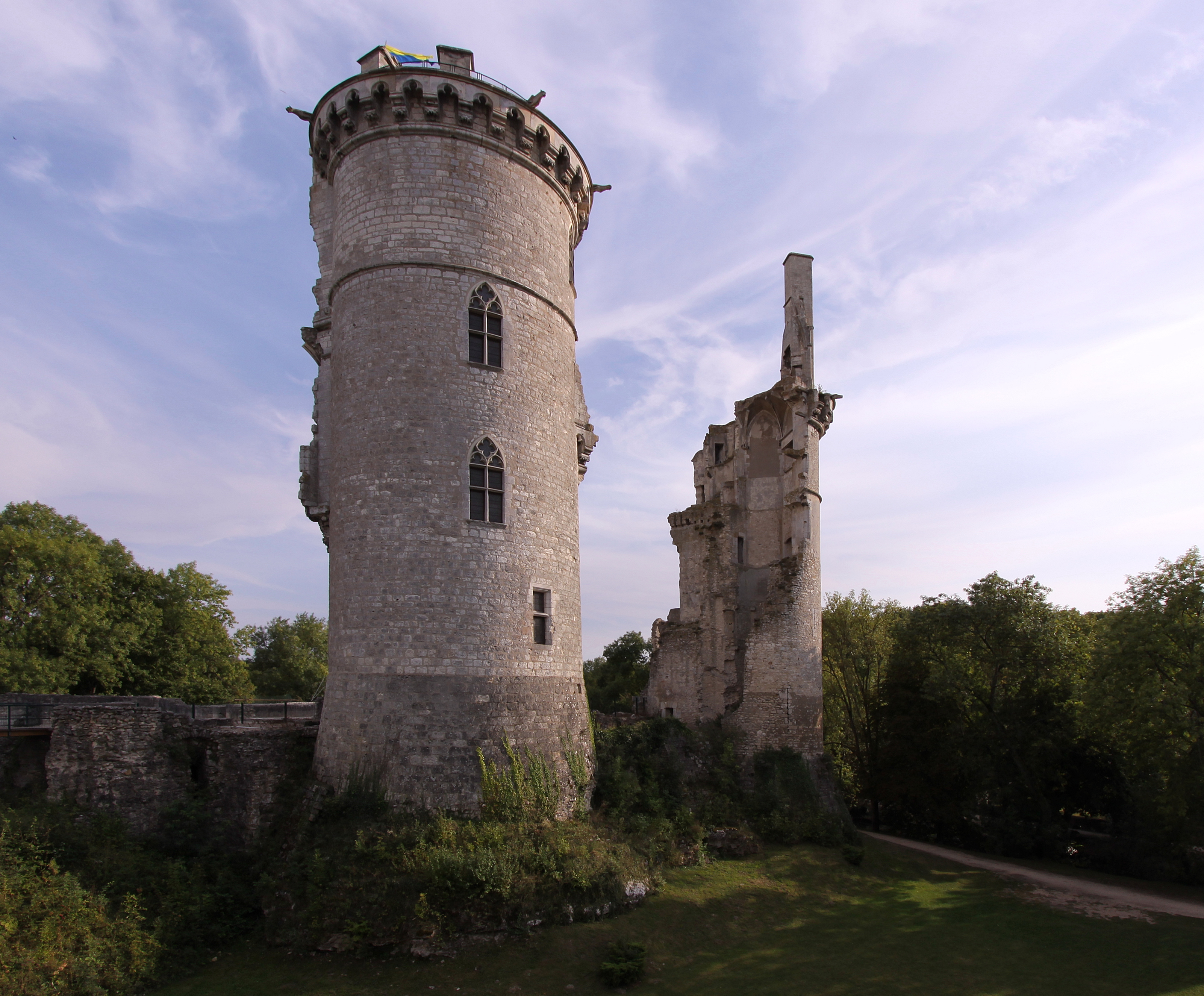 Ruines du Château Charles VII à Mehun-sur-Yèvre, Département Cher/France